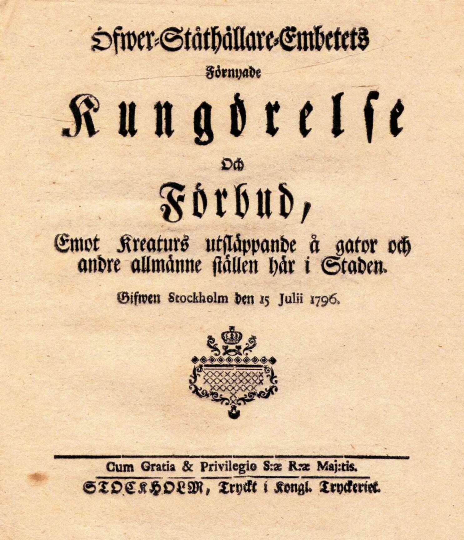 Kungörele och förbud emot kreaturens utsläppande å gator och andre allmänne ställen i Staden